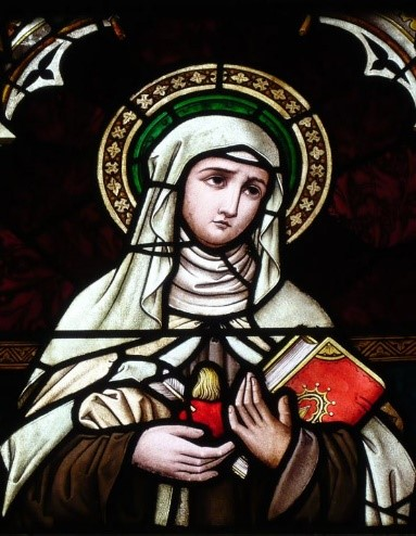 Glasbild der Heiligen Theresia von Avila, Chorraum